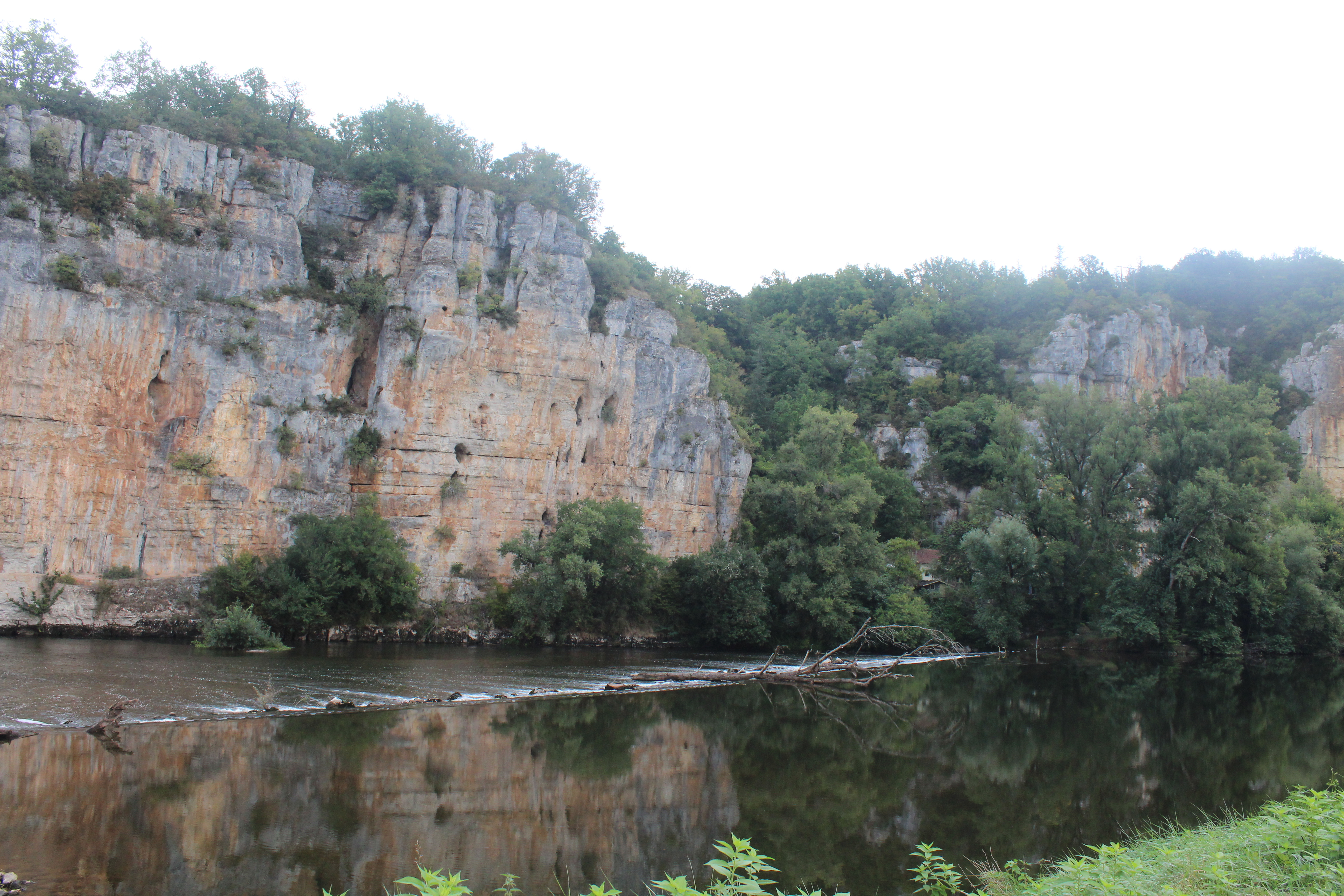 Rivière du Lot et falaises de Tour-de-Faure (département du Lot, France) depuis Castan à Saint-Cirq-Lapopie.